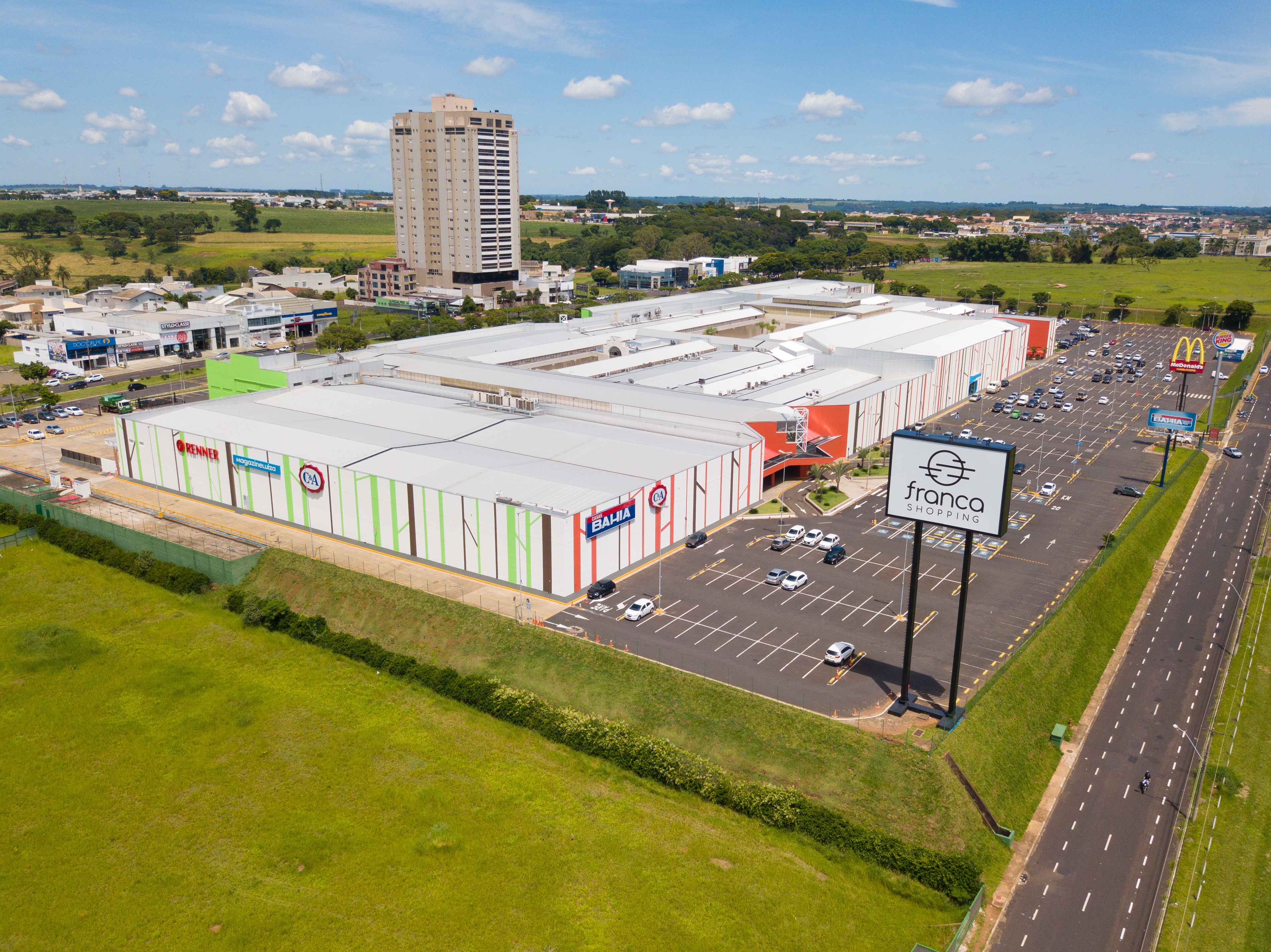 Foto aérea do Franca Shopping. Janeiro de 2020.